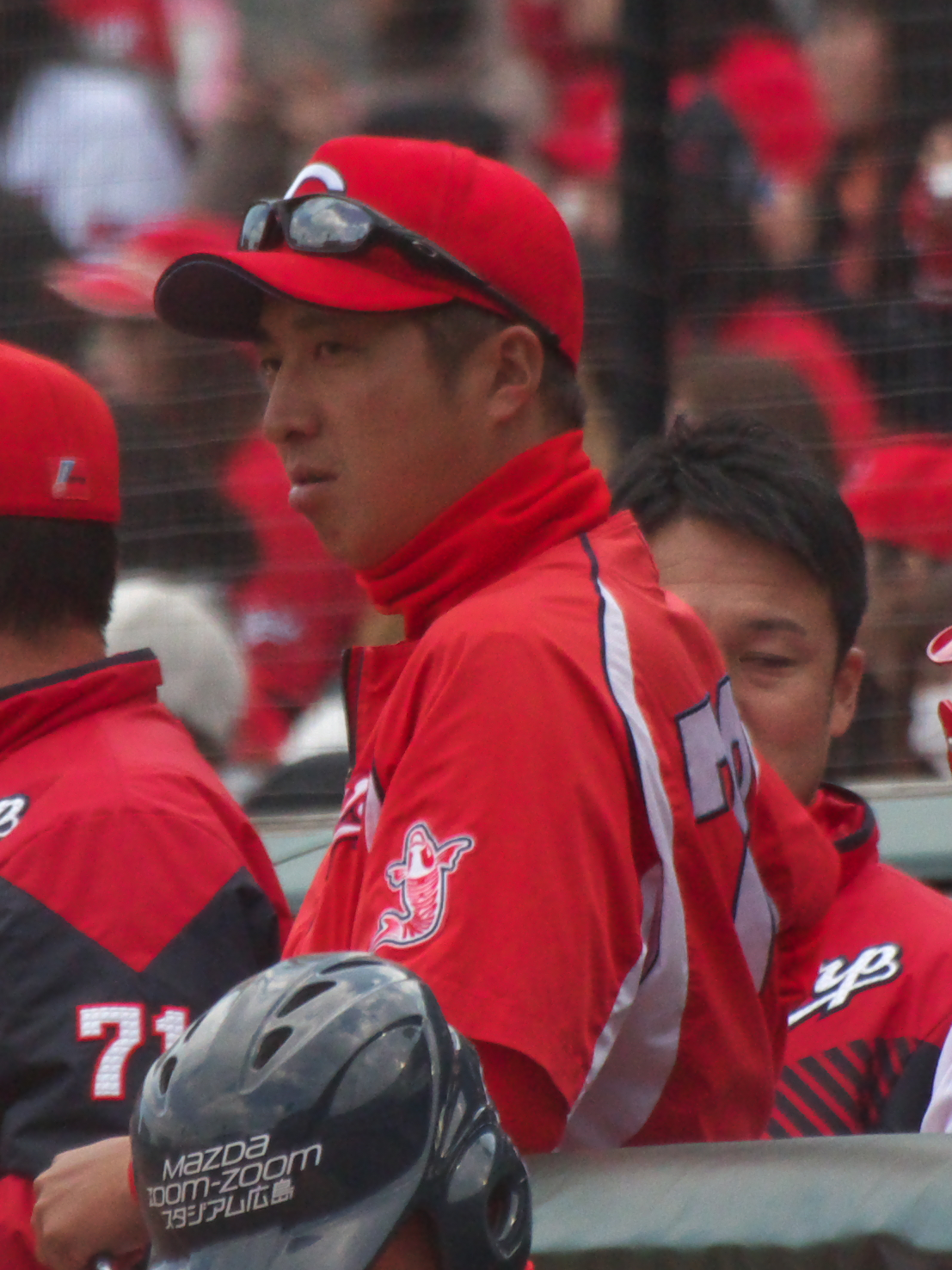 広島東洋カープ東出輝裕